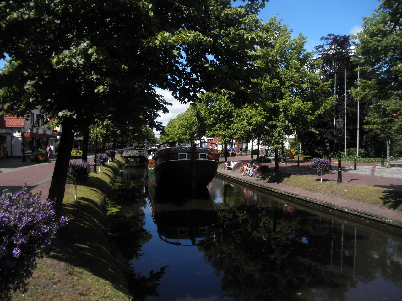 der Hauptkanal in Papenburg, Emsland